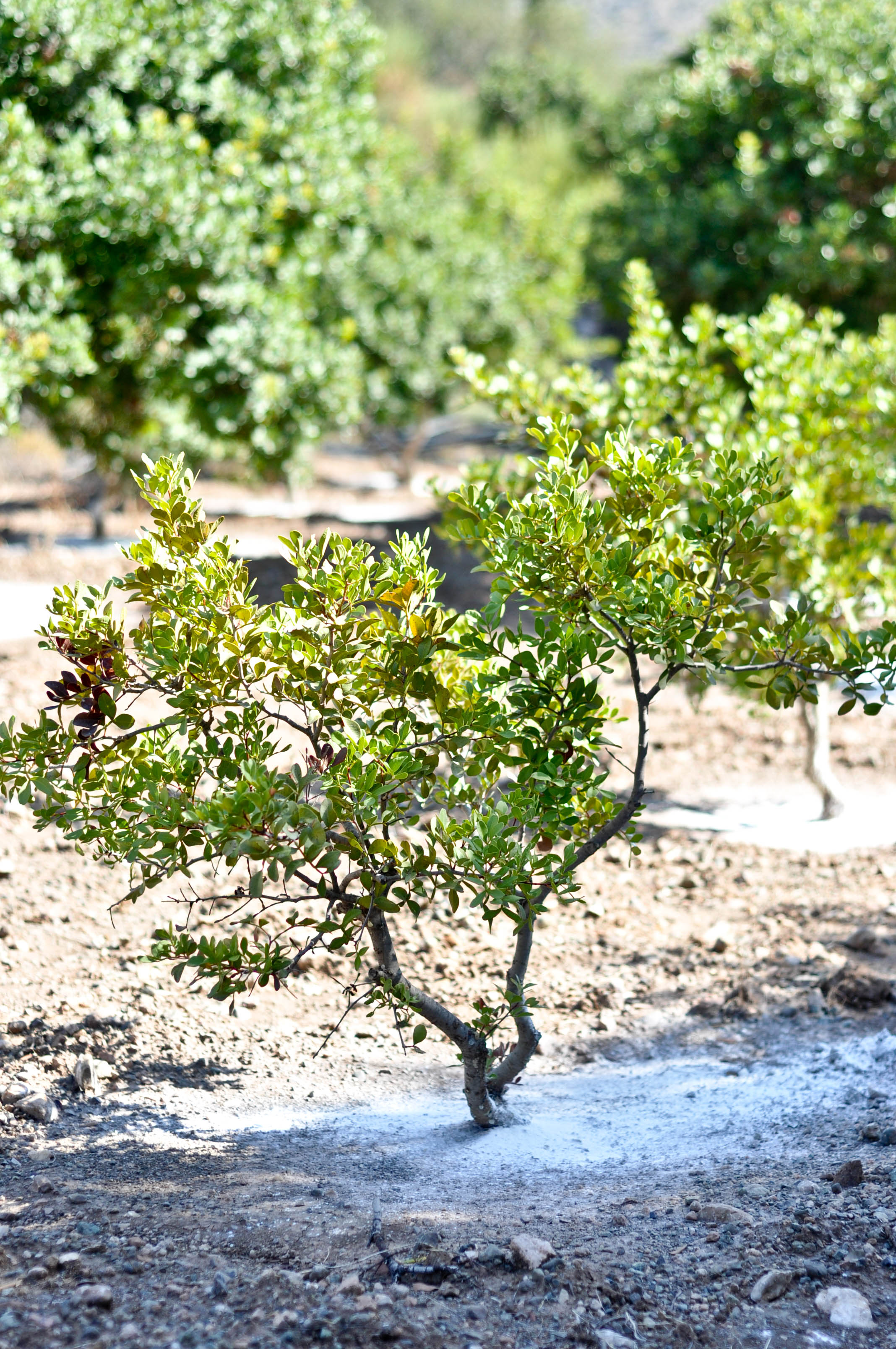 Mladé stromy mastichovníka